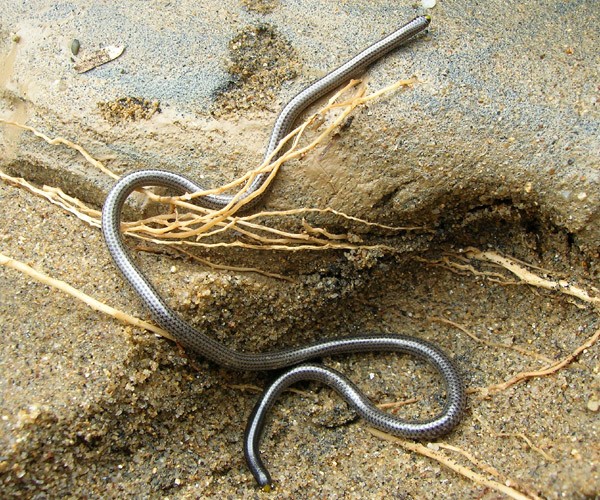 Epictia subcrotilla